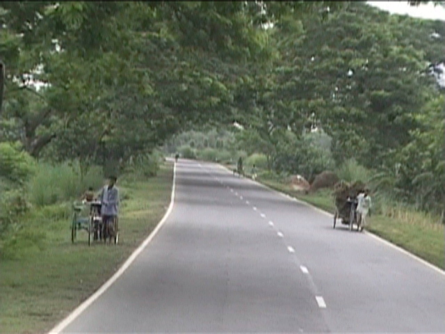 Dhaka-Bogra Highway, Bangladesh.Dhaka-Bogra Highway_1